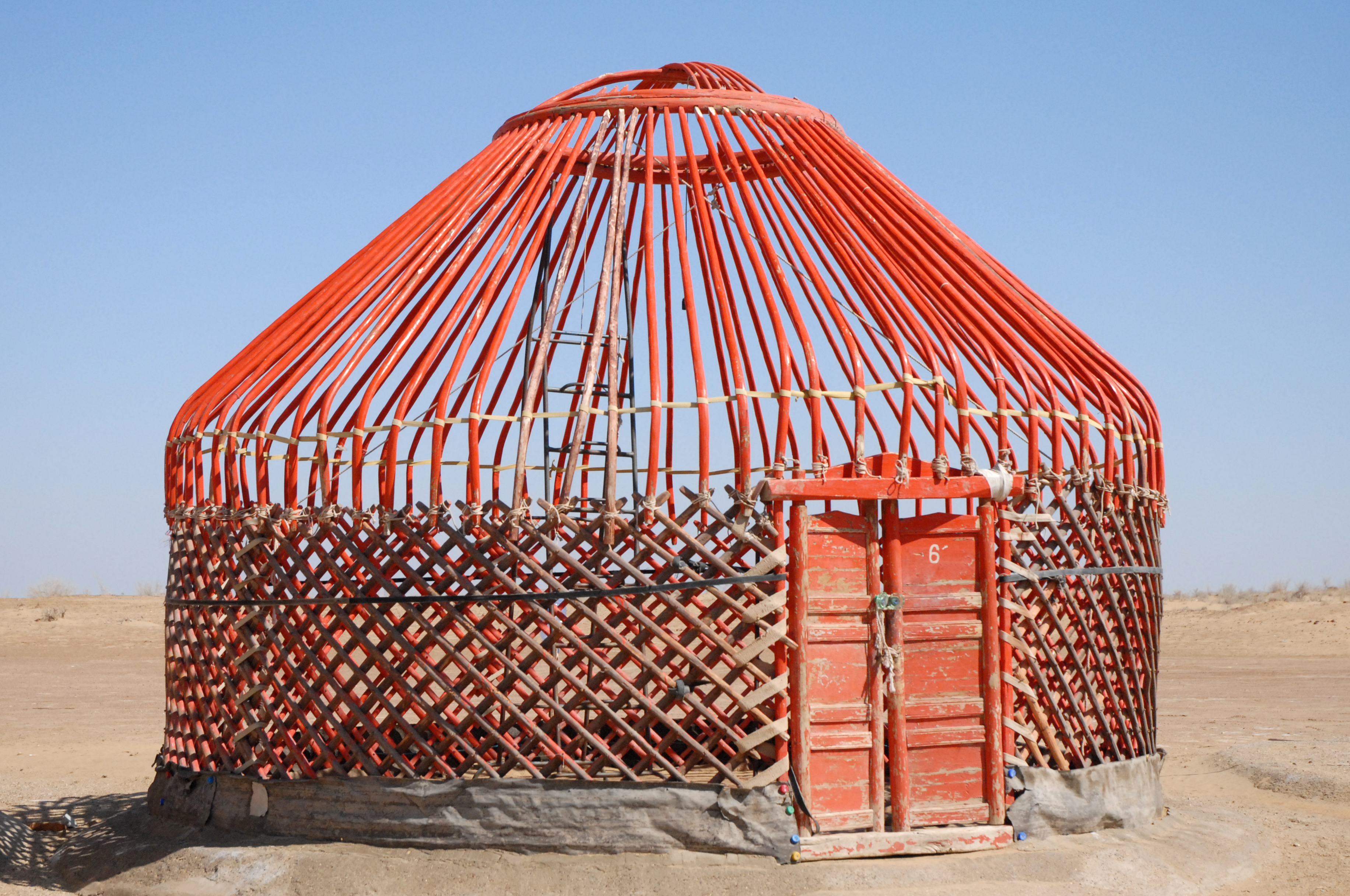 Armature de yourte en bois dans le désert du Khorezm, Ouzbékistan Des plaques de feutre sont ensuite accrochées aux tiges de bois